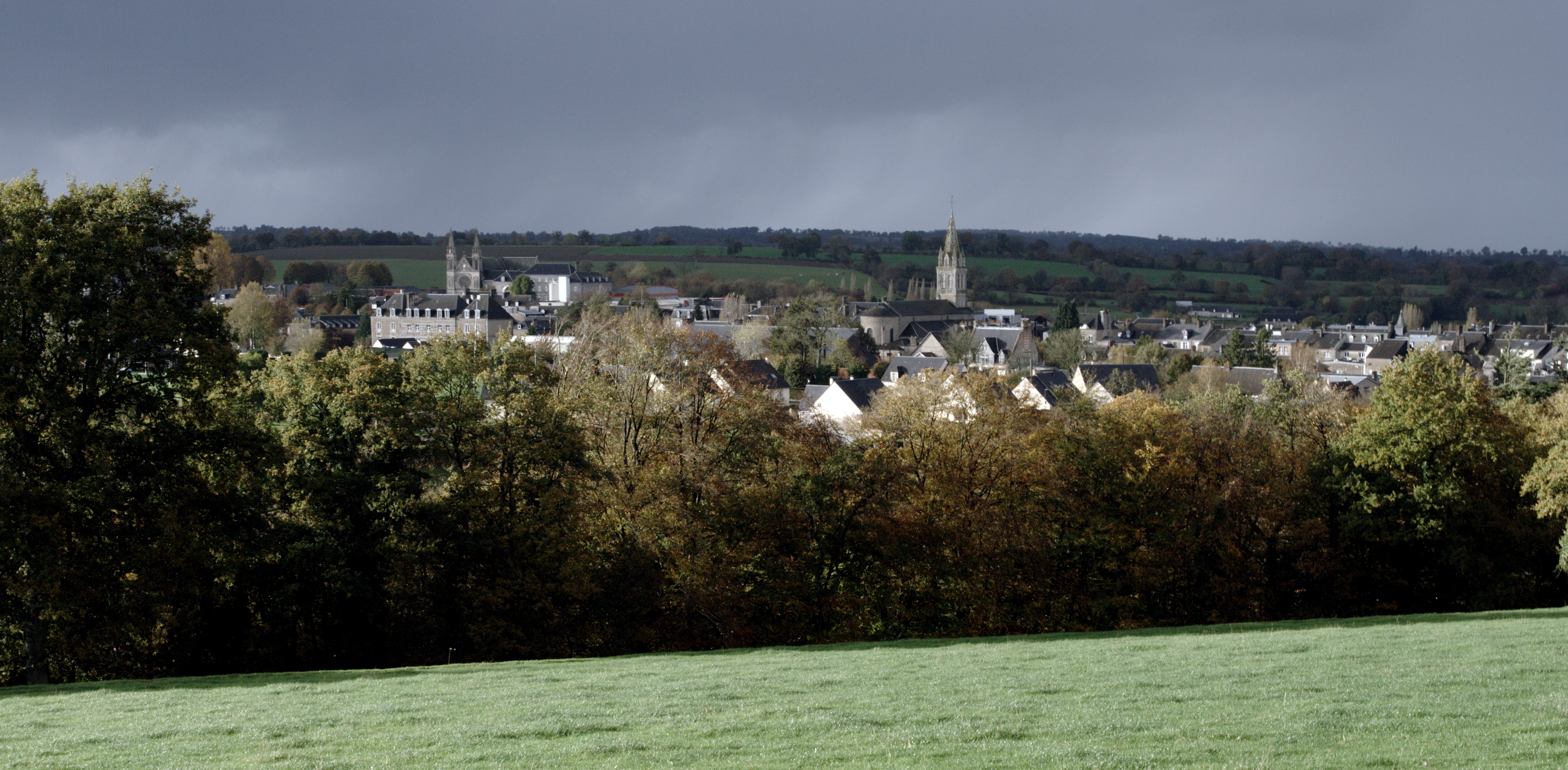 Une vue de Tinchebray des hauts de "Beaulieu" sur la route de Chanu.